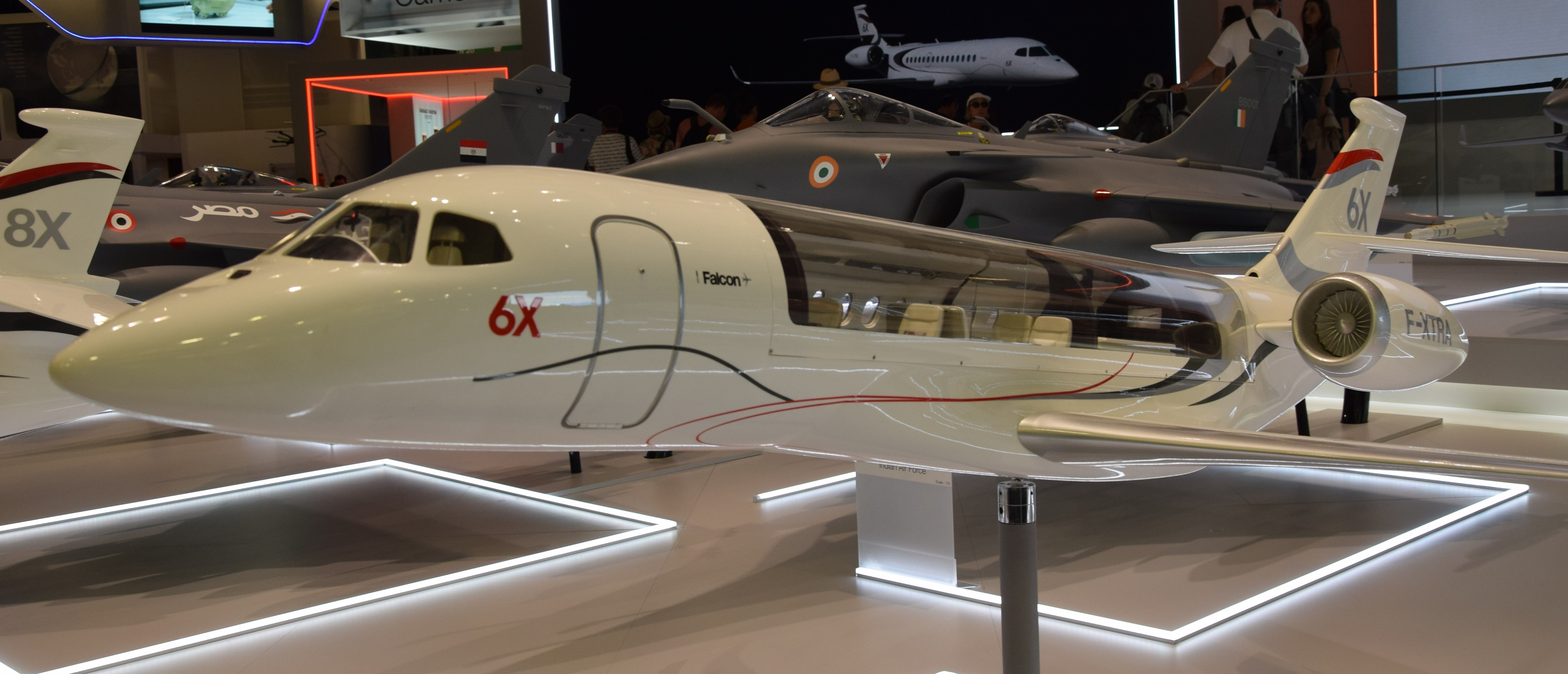 Maquette du Falcon 6X, au stand de Dassault Aviation au salon du Bourget 2019.